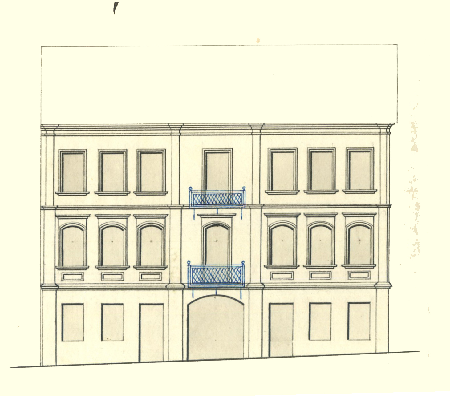 Беларуская (тарашкевіца): Менск (Miensk), вуліца Койданаўская (vulica Kojdanaŭskaja). Пляны і рысункі мураванага трохпвярховага жылога дома і гаспадарчых пабудоваў купца Г. Вечарэвіна (Viečarevin)